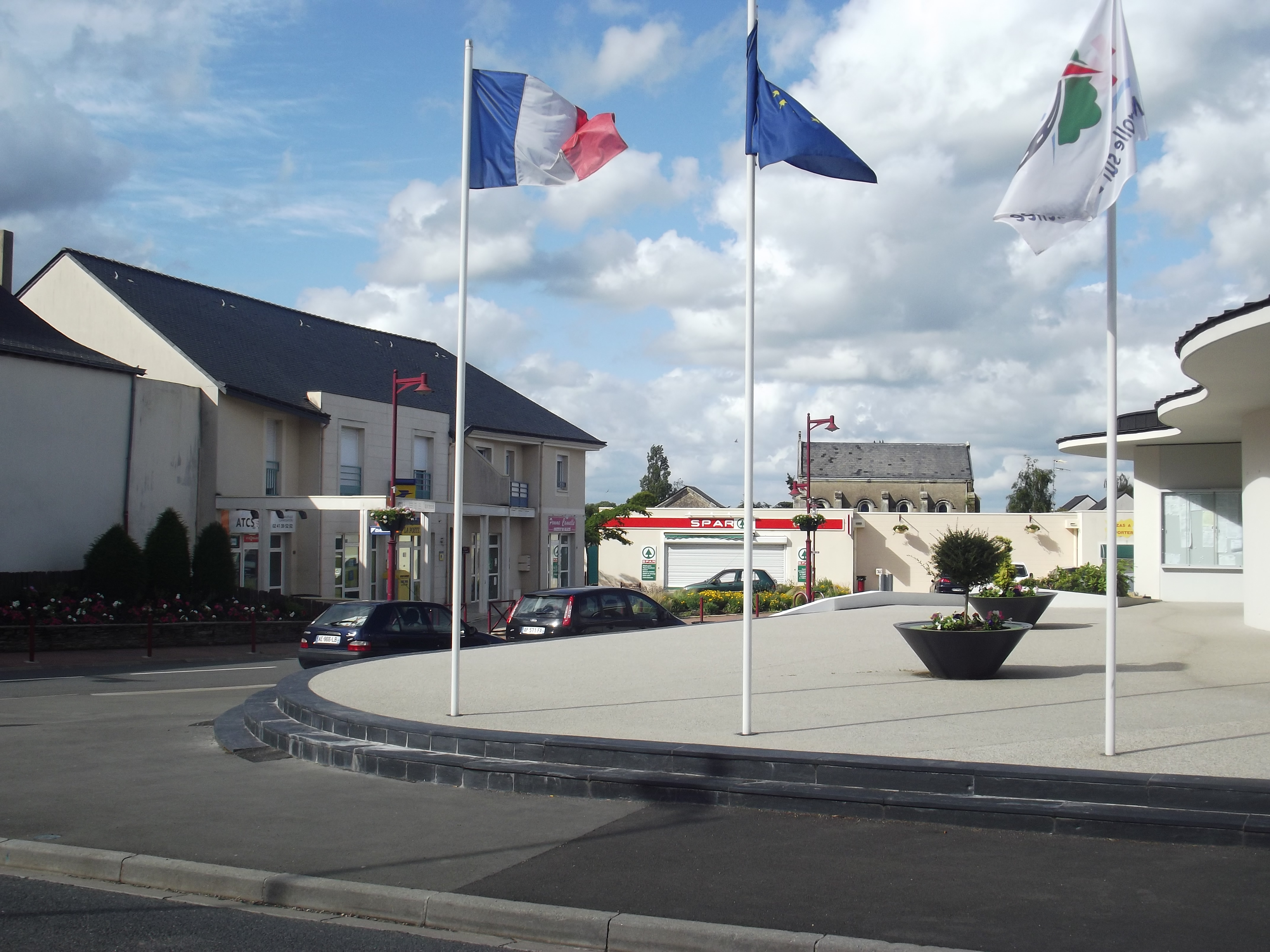 Place Eric Tabarly et le parvis de la mairie, un dimanche, à La Membrolle-sur-Longuenée (Maine-et-Loire), France